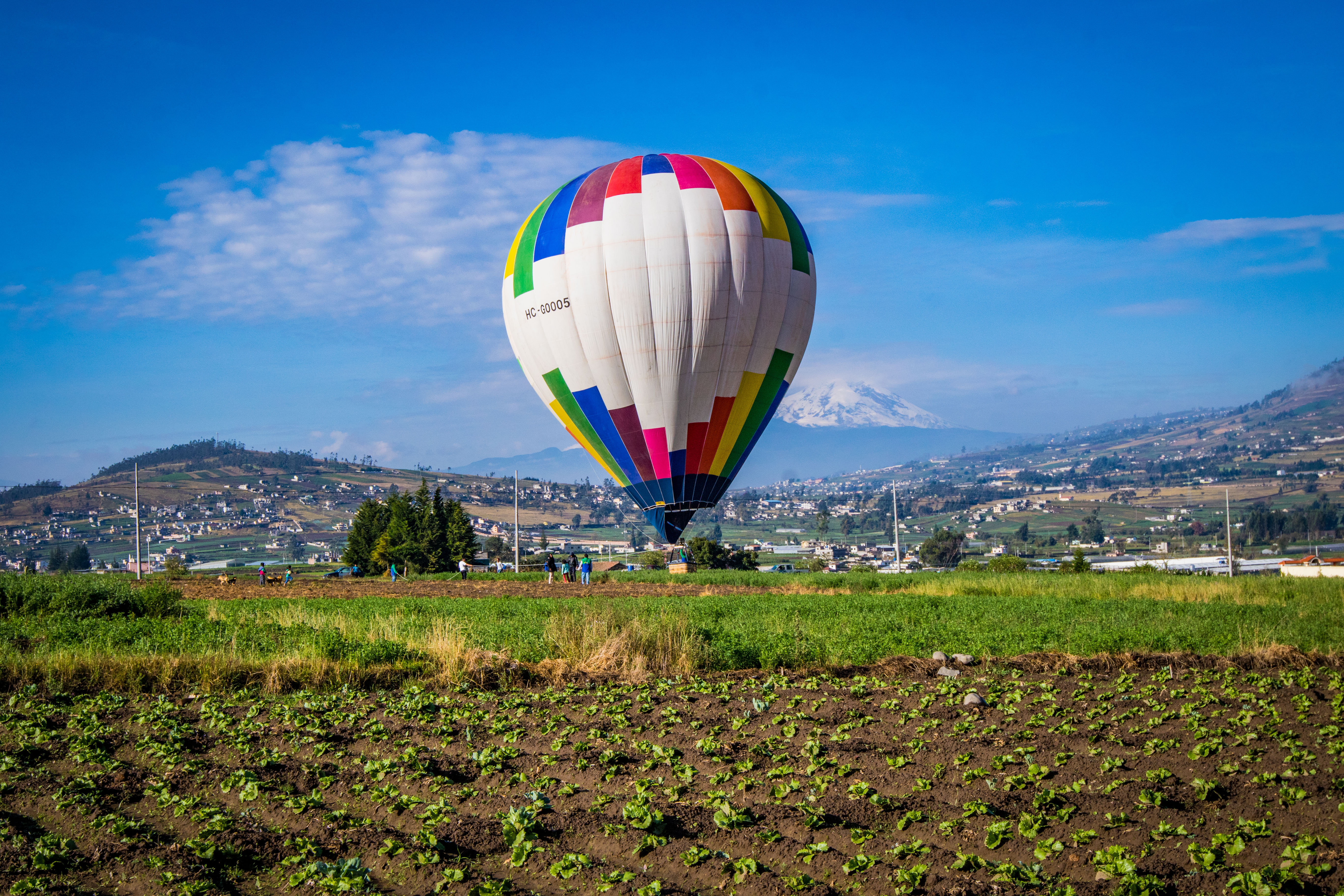 Ambato, Tungurahua 24 May (ANDES).- El emprendimiento de Christian González, gernte general de Gloapsa, es un globo aerostático, dando color y vida a los cielos Ambateños, ésta es una experiencia maravillosa. Fotografías: Carlos Rodríguez/Andes. Quito 22 Mar, (ANDES).- En la hacienda Cashapamba se reunieron hoy delegaciones del gobierno colombiano con representantes del Ejercito de liberación Nacional, ELN, para continuar con los diálogos de paz. La Canciller ecuatoriana Maria Fernanda Espinosa presidió ésta mesa. Fotografías: Carlos Rodríguez/Andes.